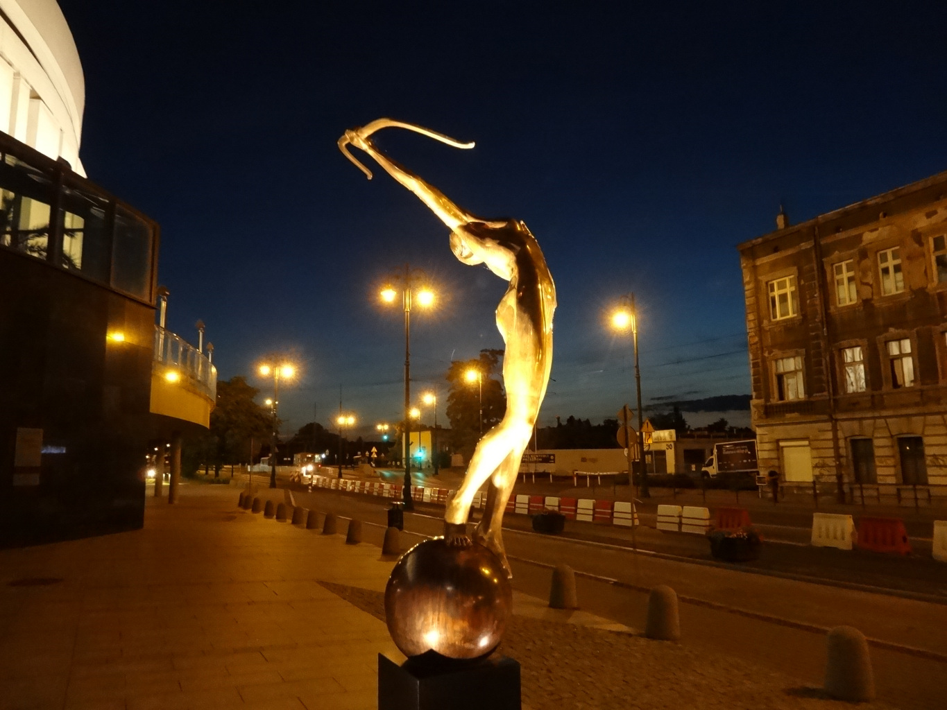 Łuczniczka Nova ustawiona przed Operą Nova w Bydgoszczy w 2013 roku